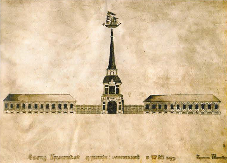 Беларуская (тарашкевіца): Крычаў (Kryčaŭ), рака Сож (Sož). Вэрф